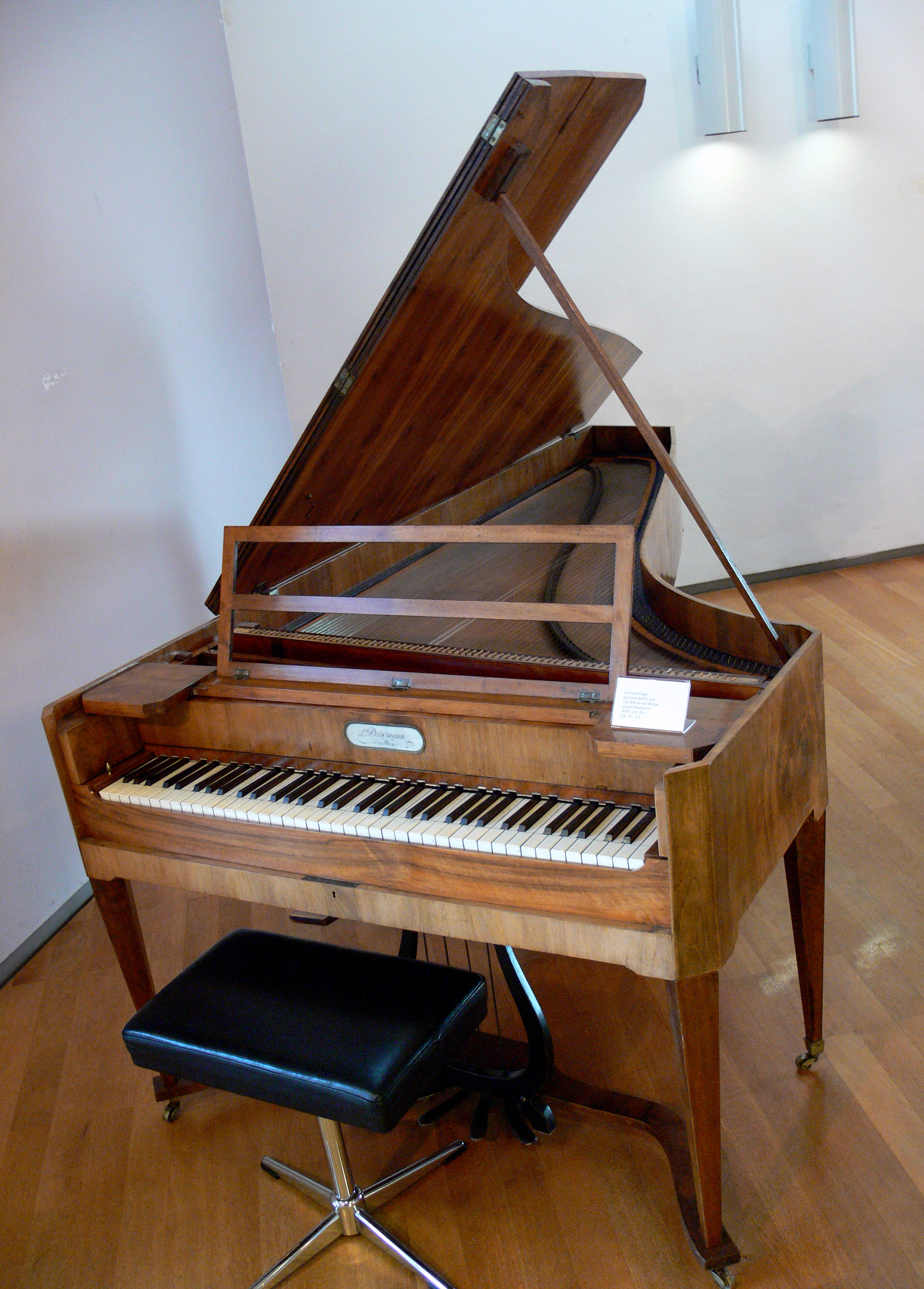 Hammerflügel aus dem Besitz von Carl Maria von Weber, Joseph Brodmann, Wien um 1810 Musikinstrumentenmuseum Berlin, Kat.-Nr. 312